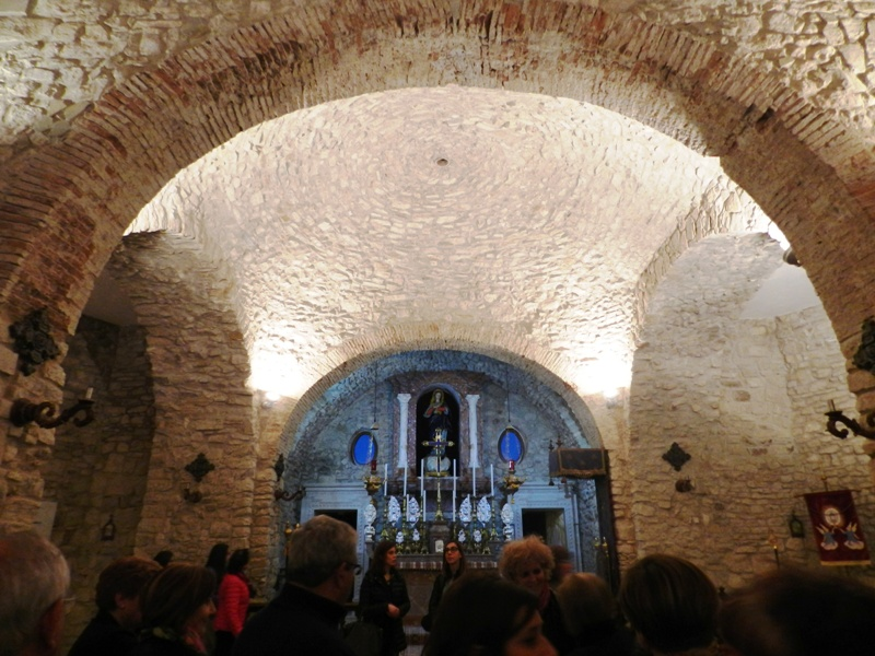 La chiesa di Santa Maria dei Greci (XI secolo) a Molinara, in provincia di Benevento